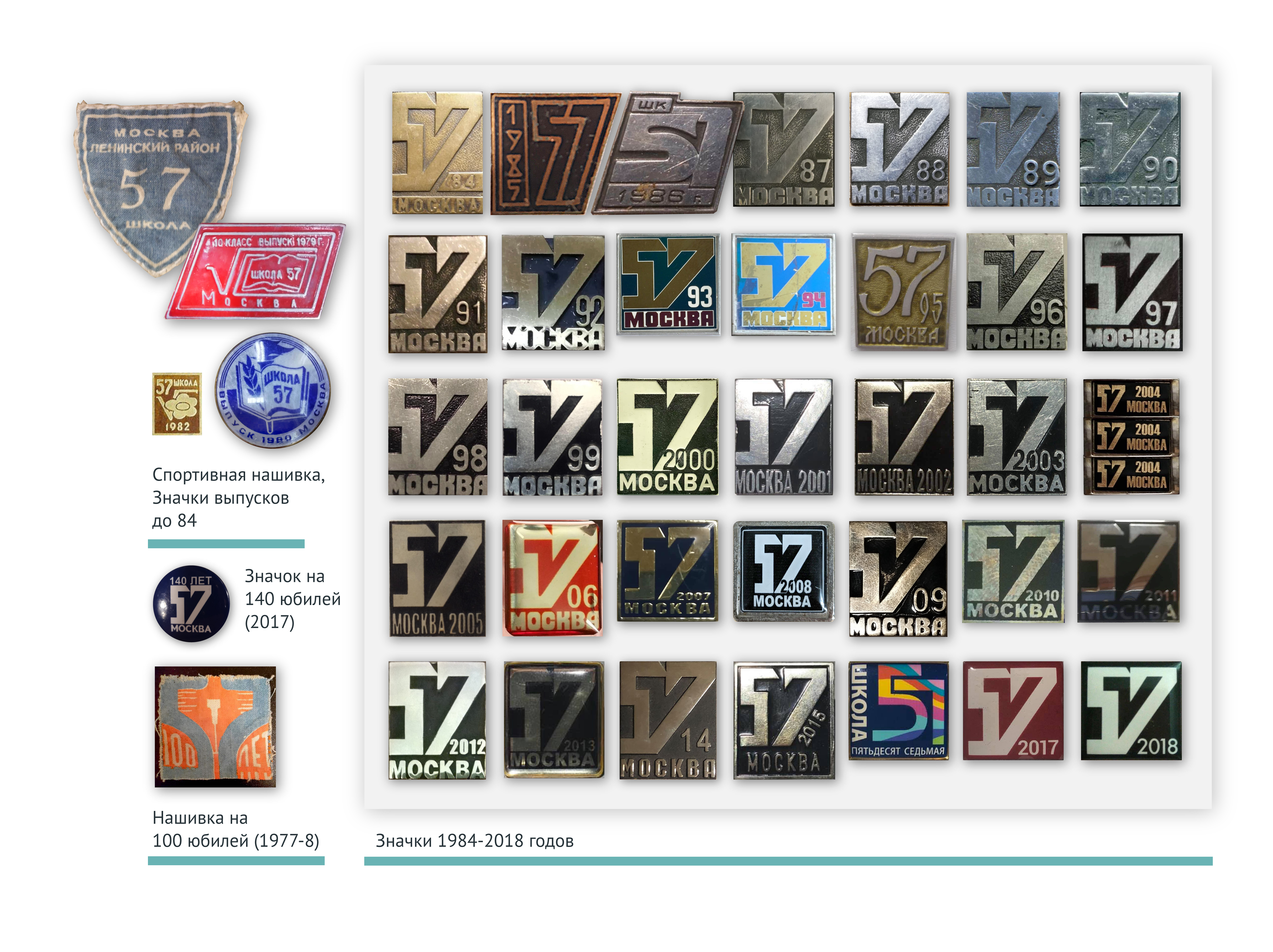 Коллекция выпускных значков и спортивных нашивок Московской Школы 57, собранная силами сообщества выпускников в 2016-2018 годах